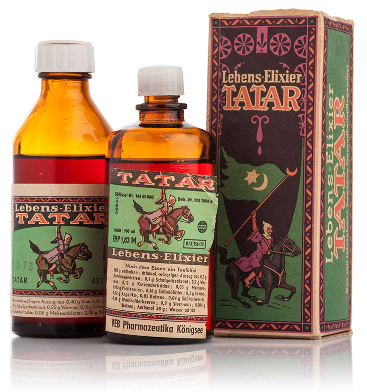 Alte Packungen des Gesundheitspflegemittels Lebens-Elixier TATAR vom VEB TATAR Köthen und VEB Pharmazeutika Königsee.